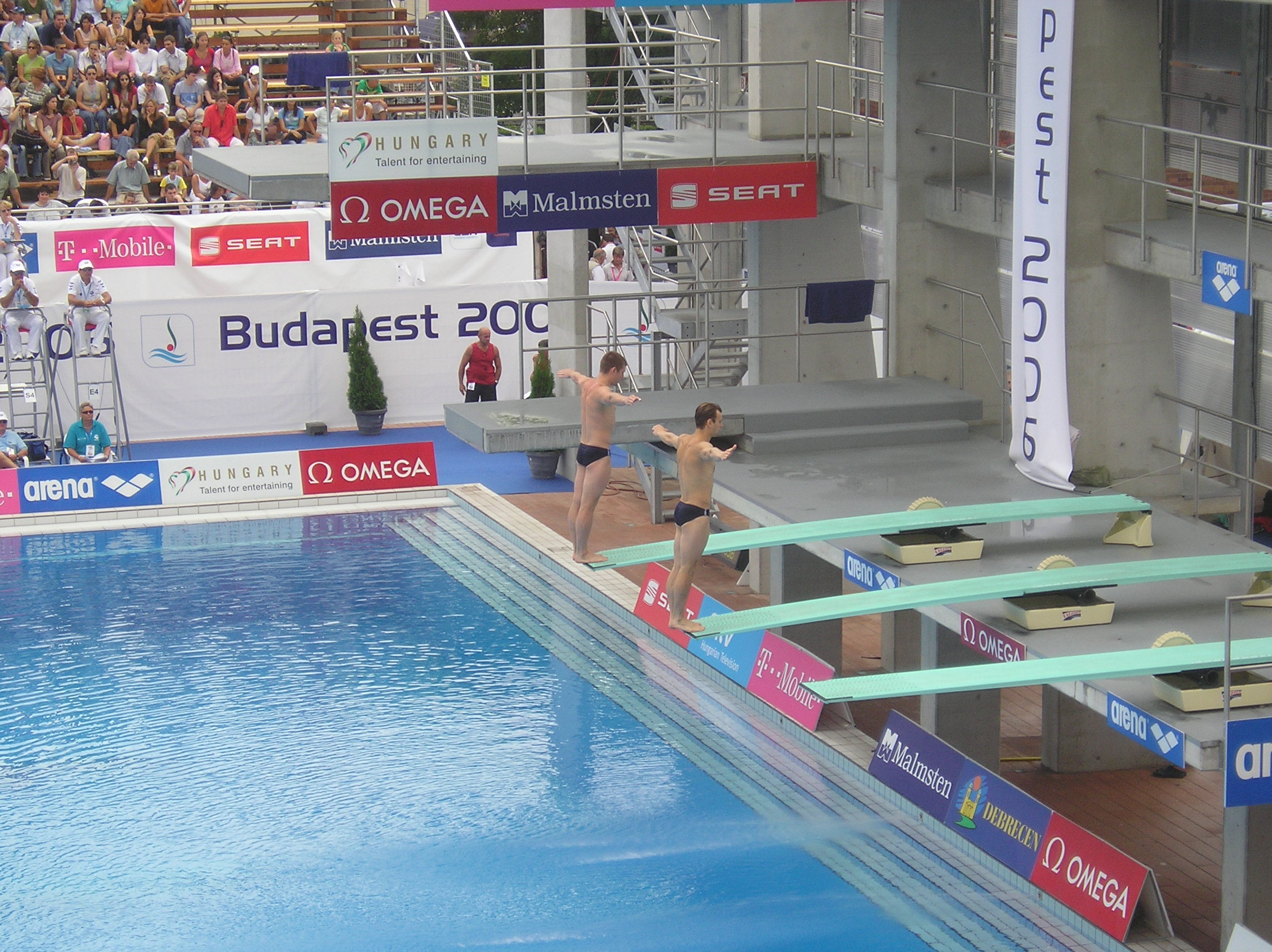 Kwalificatie 3 meter plank synchroon voor mannen tijdens het EK Zwemmen 2006 in Boedapest